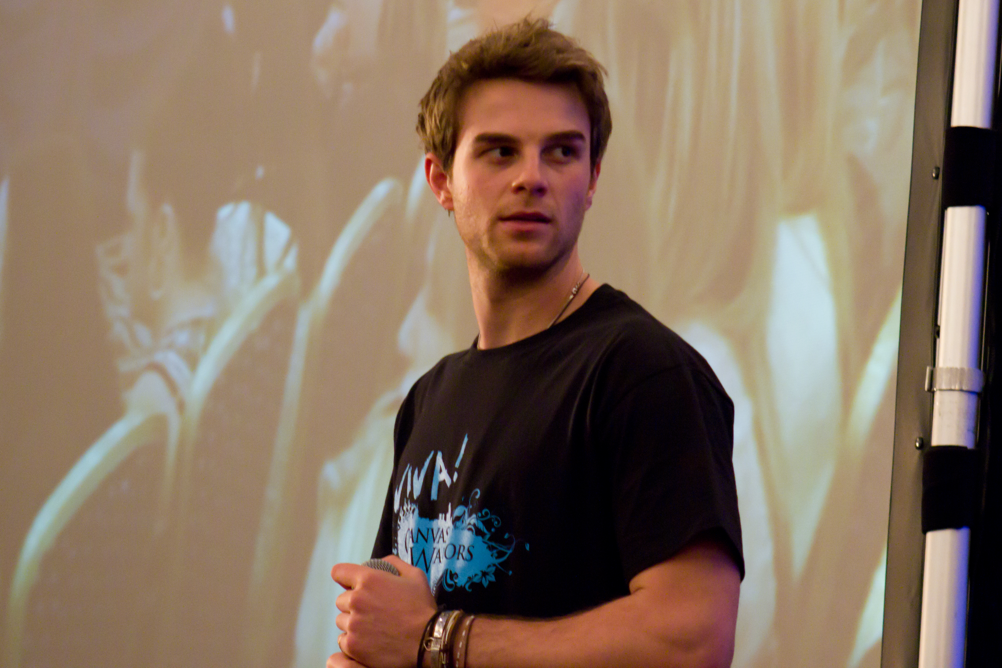 Nate Buzolic